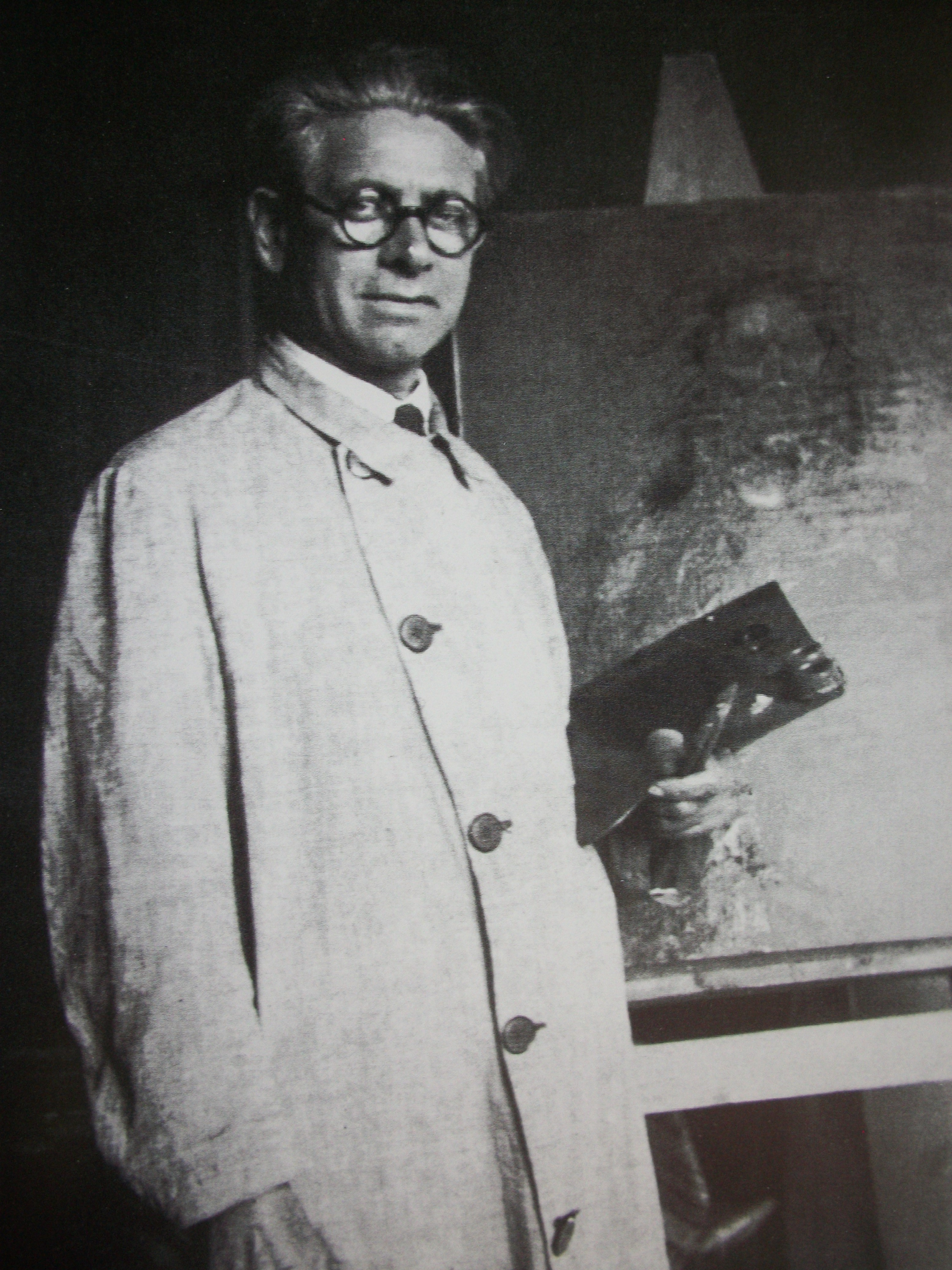 Andrea Alfano (1879-1967)